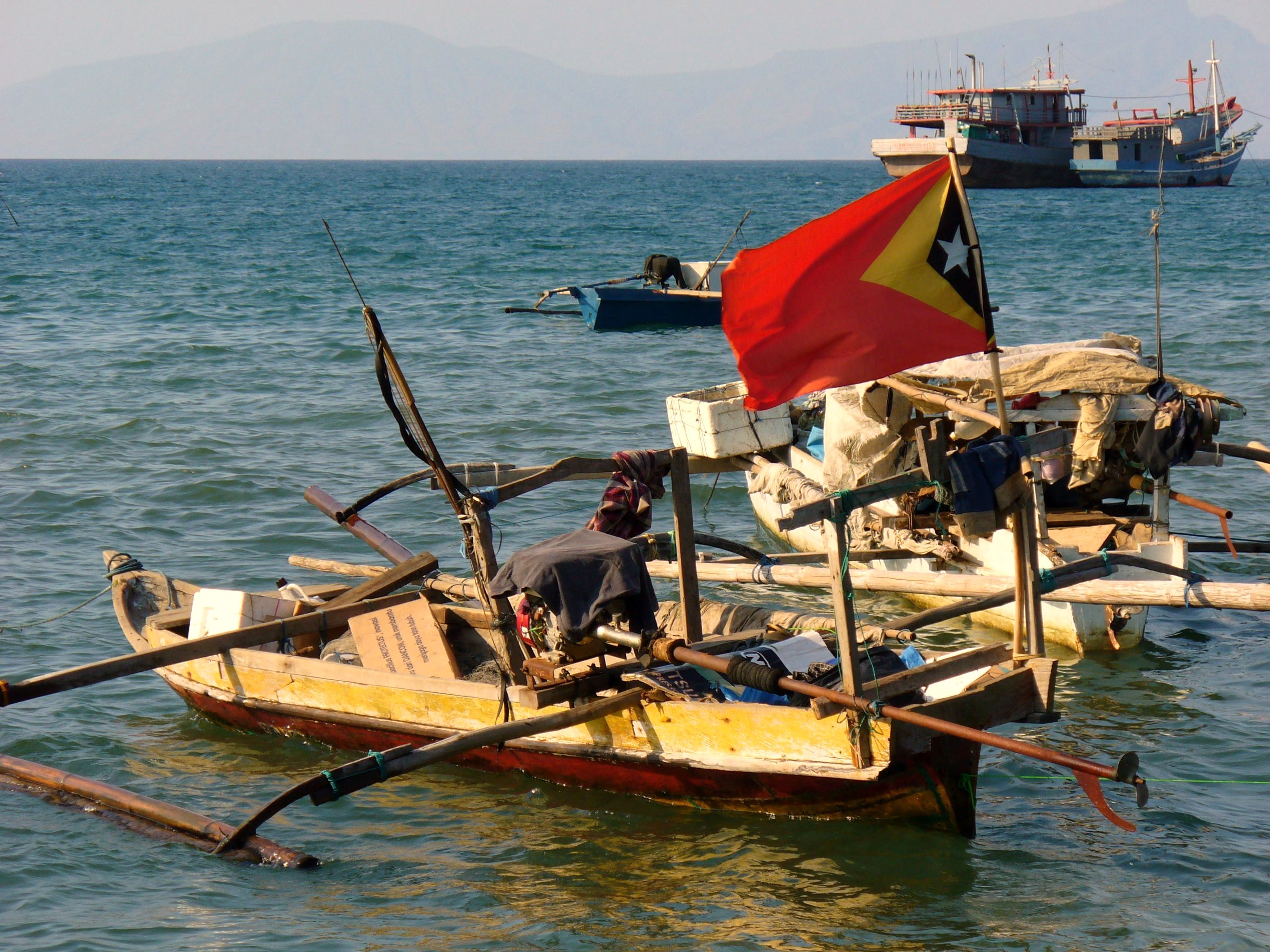 Dili, East Timor